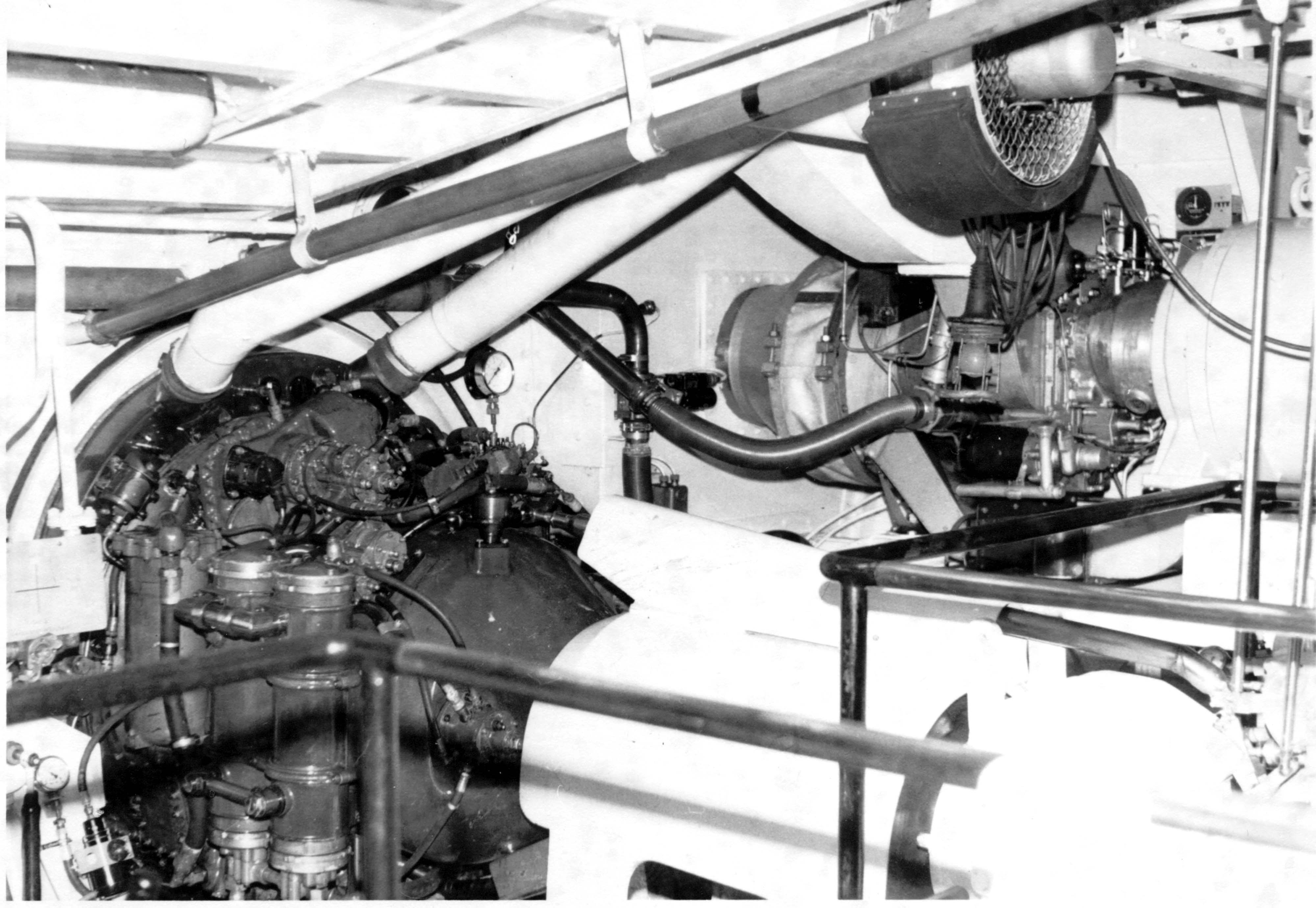 Turbine